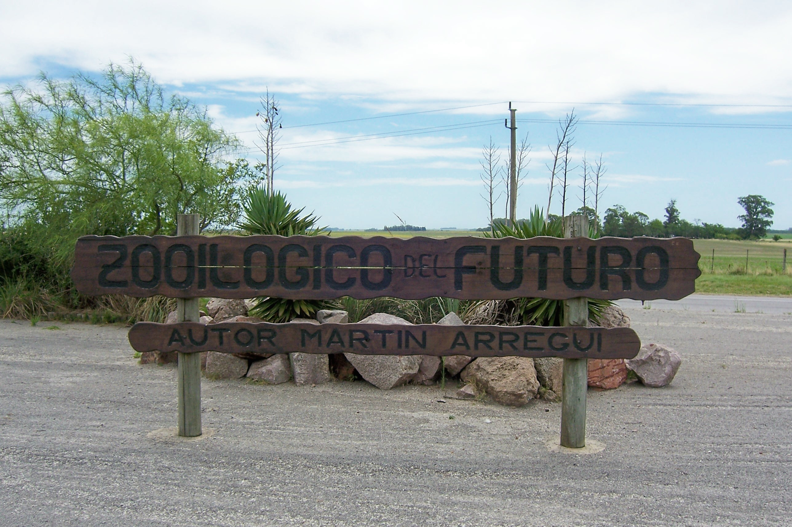 Zooilógico del futuro, grupo escultórico de Martín Arregui, cercano a la ciudad de Trinidad, Uruguay.